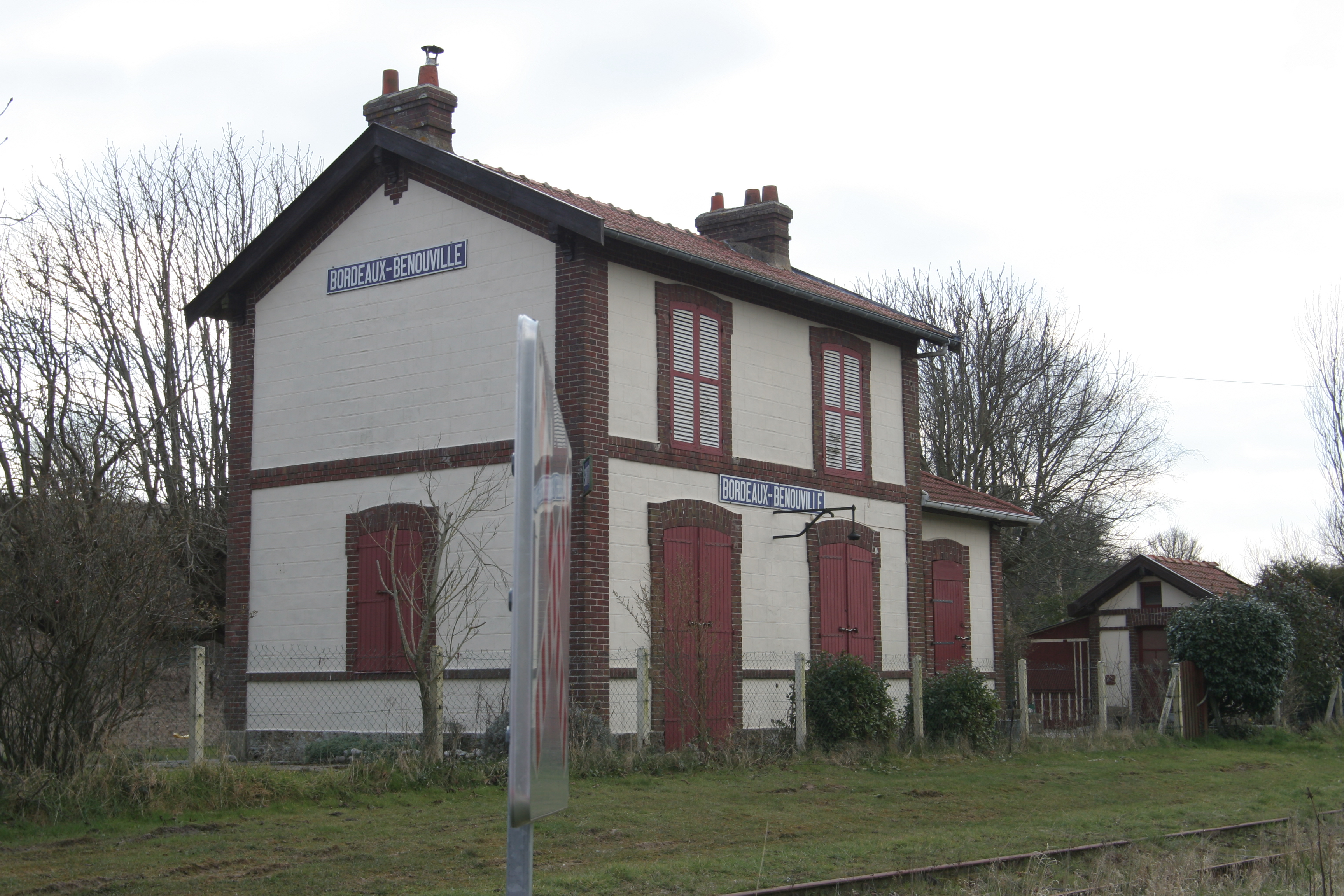 Ancienne gare de Bordeaux - Bénouville.